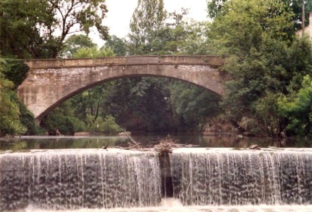 La Ponte de Cayés sobre el río Nora, en el concejo asturiano de Llanera, España.